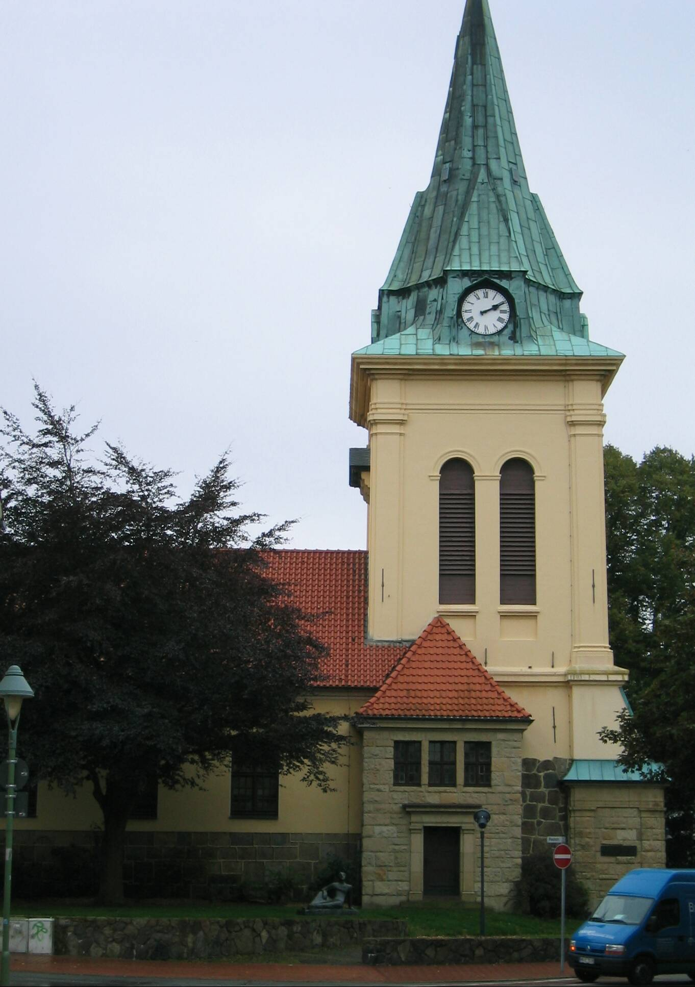 Lehe: Dionysius-Kirche (Alte Kirche) in Alt-Lehe